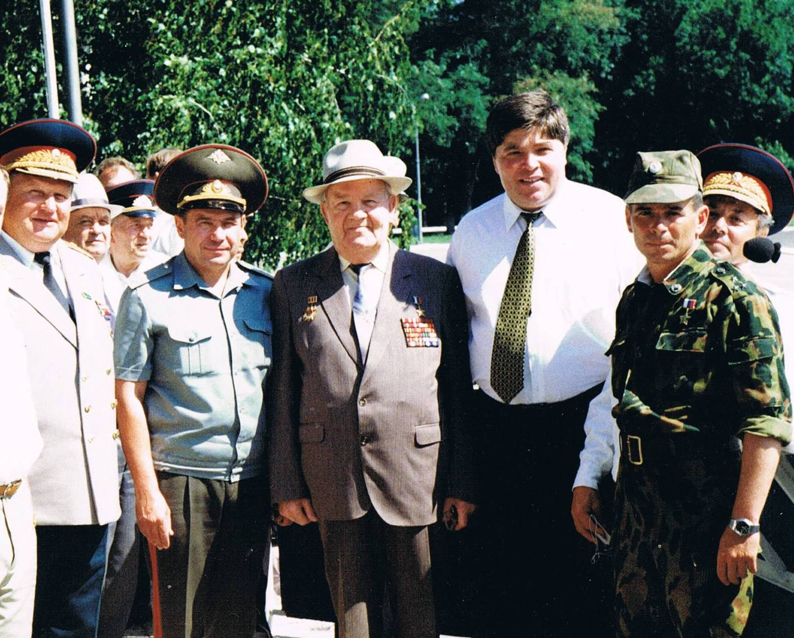 Герой Российской Федерации Козлов Олег Александрович на 80-летии Краснодарской Краснознамённой дивизии.Плац 131-й ОМСБр. Майкоп 1998.